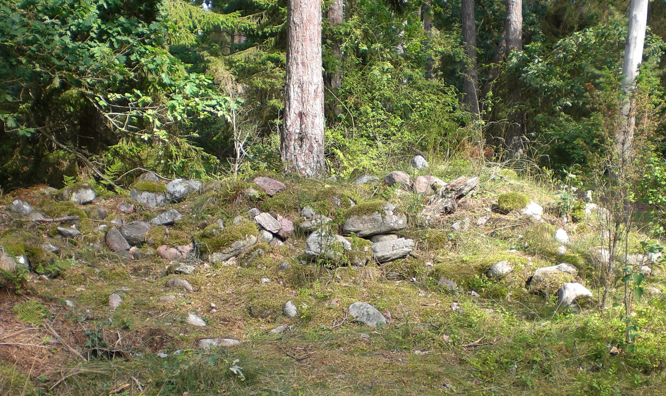 Jaktmuren/Jagdmauer, Reste der Mauer im Trollskogen, Öland, Schweden.